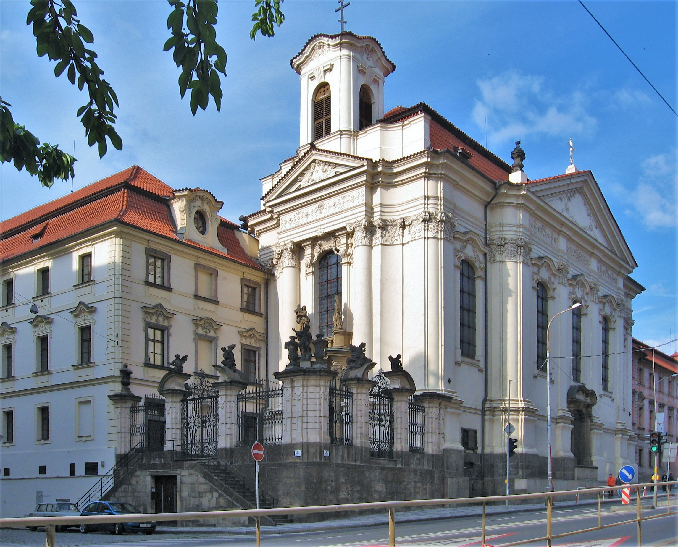 Pravoslavný katedrální chrám sv. Cyrila a Metoděje, Resslova ulice, Praha